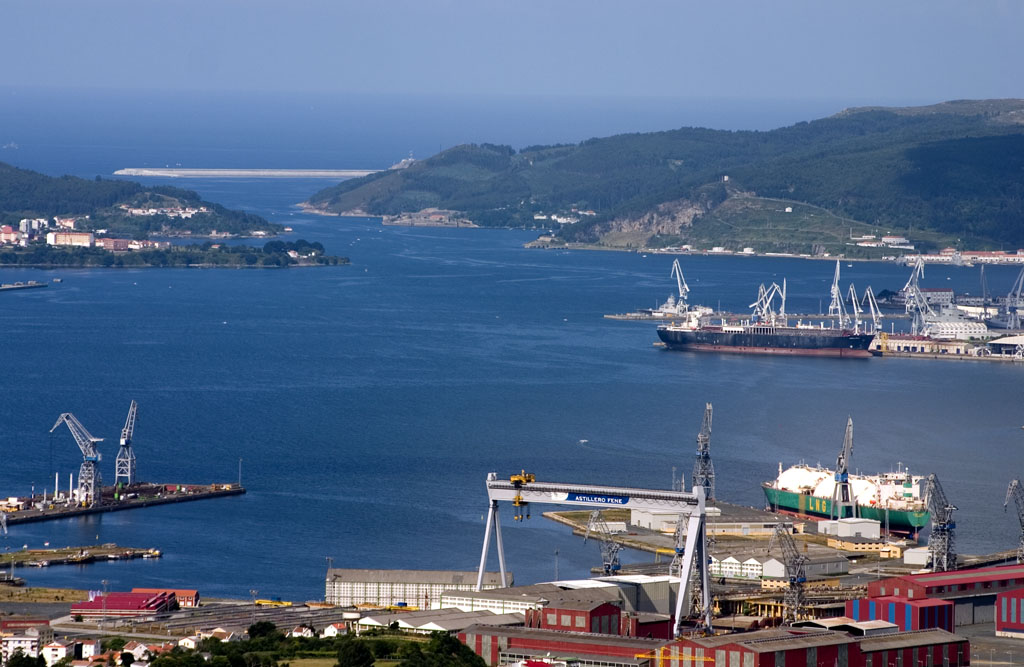 Imaxe da ría de Ferrol amosando parte dos dous grandes estaleiros. Ría de Ferrol, Galicia, Spain.